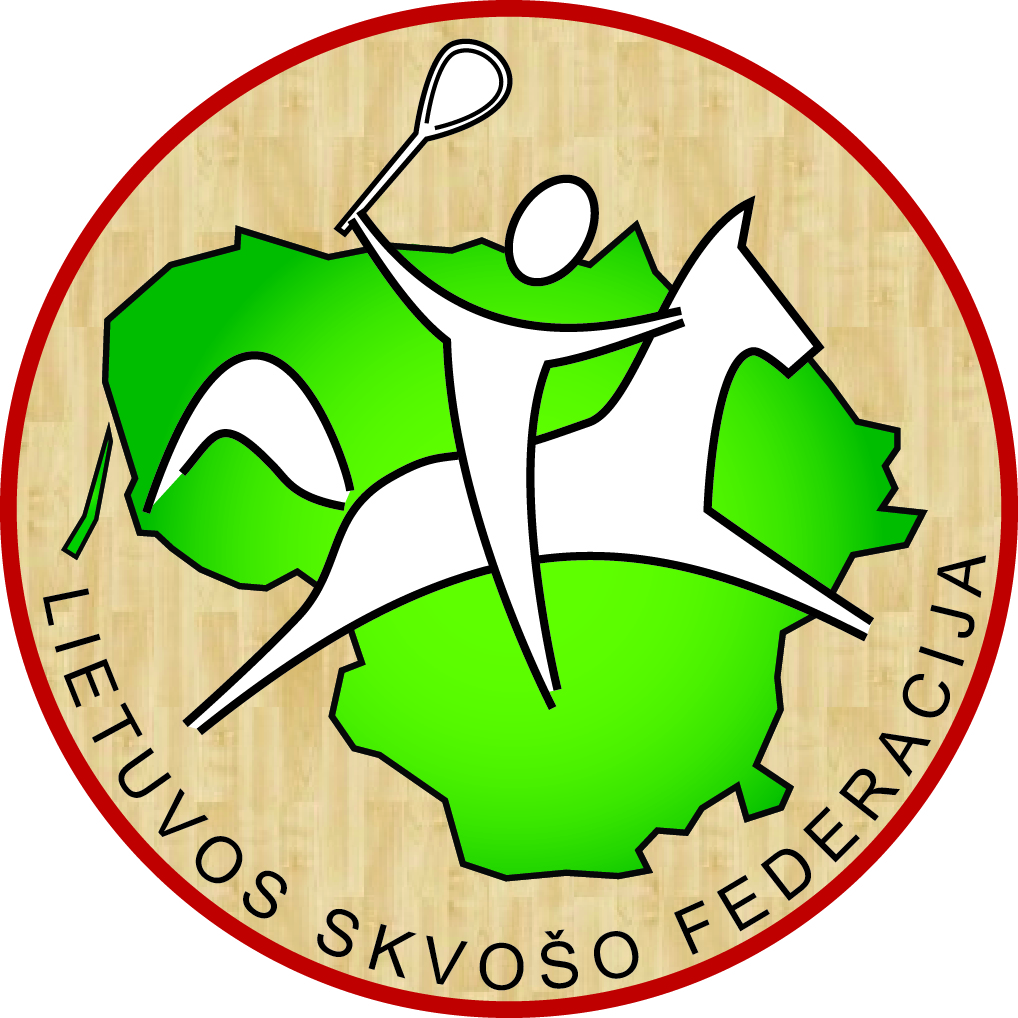 Lietuvos Skvošo Federacijos logotipas